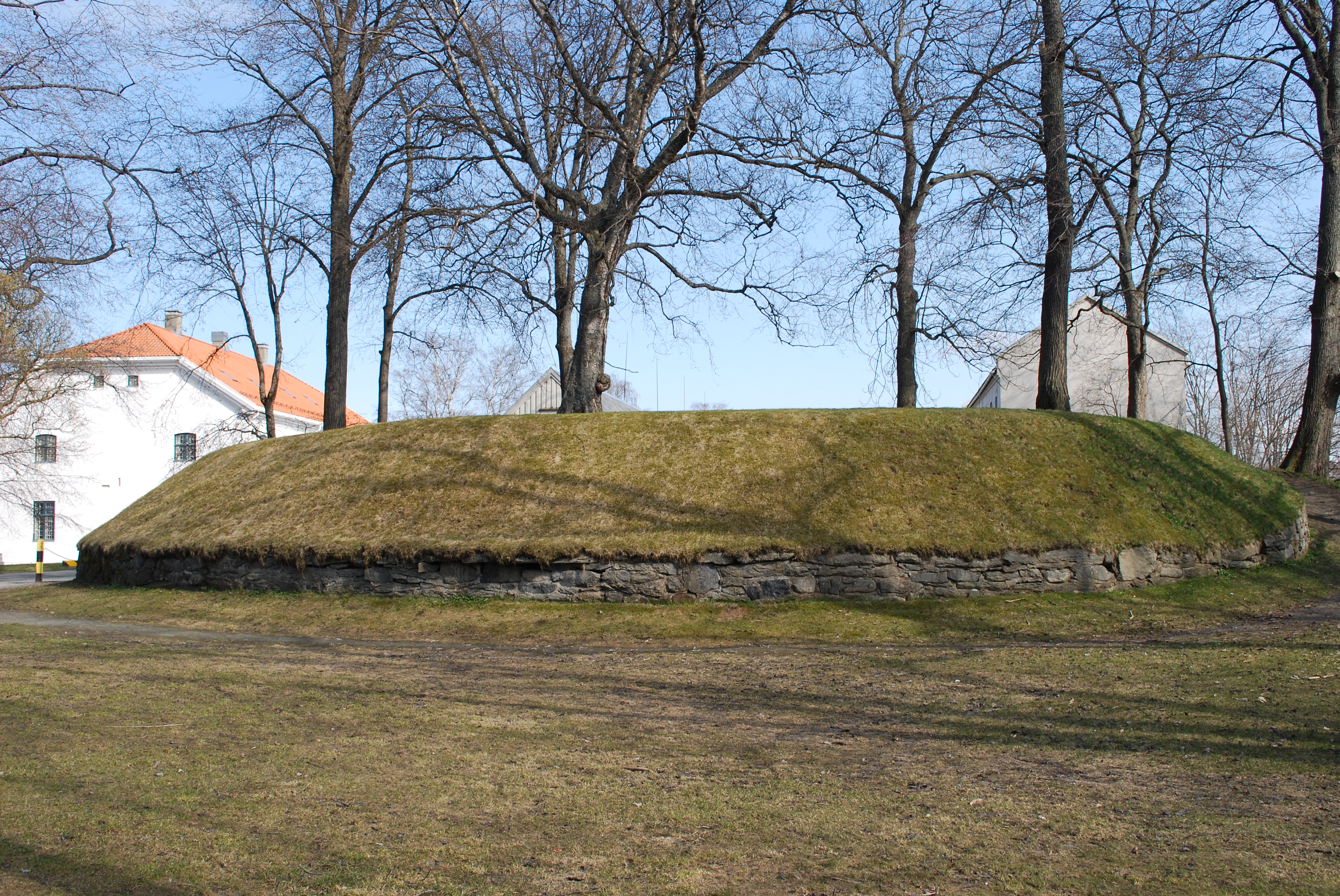 Gjenværende skanse ved Ilevollen i Trondheim, rett bak Ilen kirke.